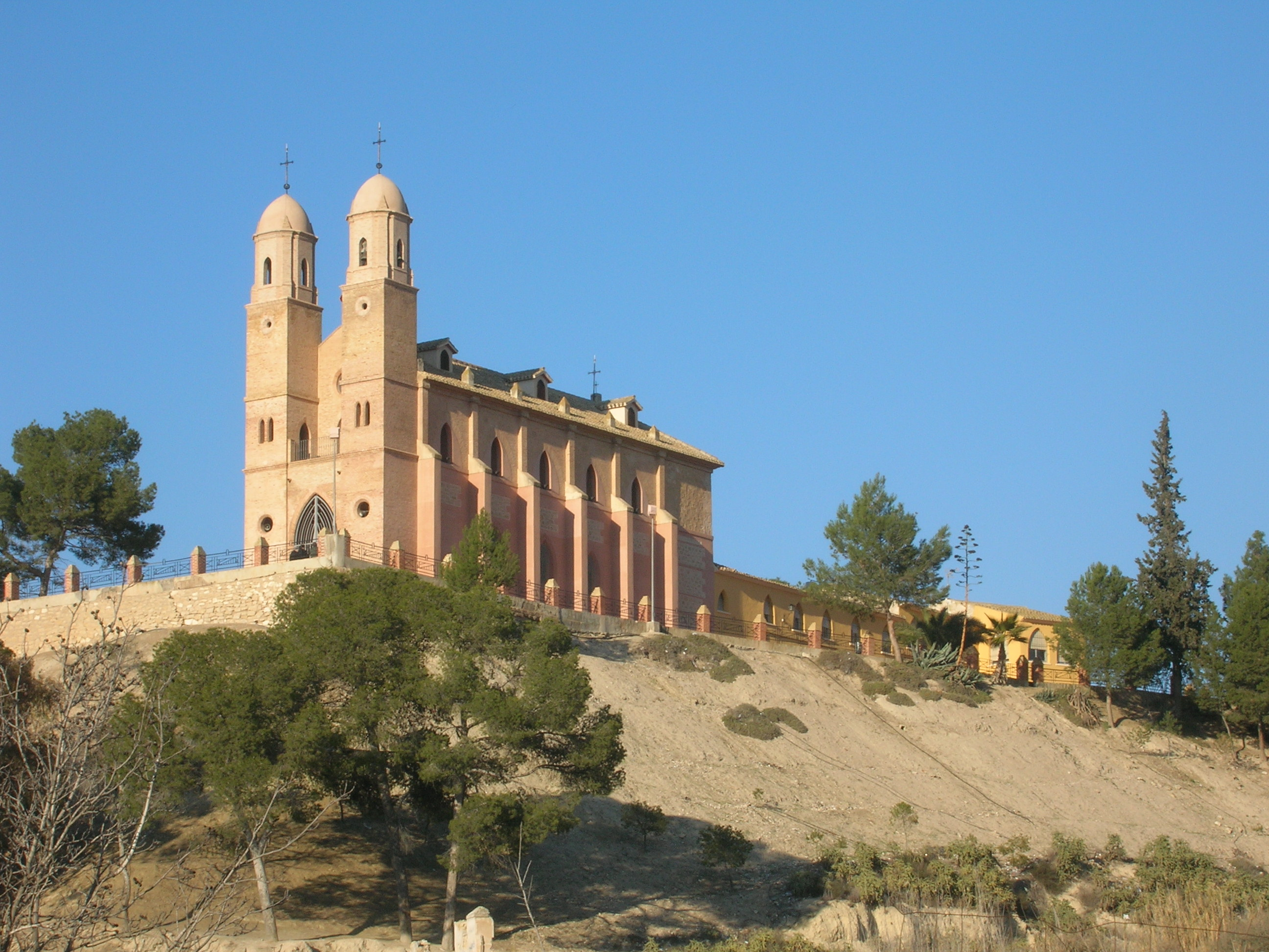 Ermita del santo Cristo del Consuelo, en Cieza, Murcia, España, febrero de 2006.